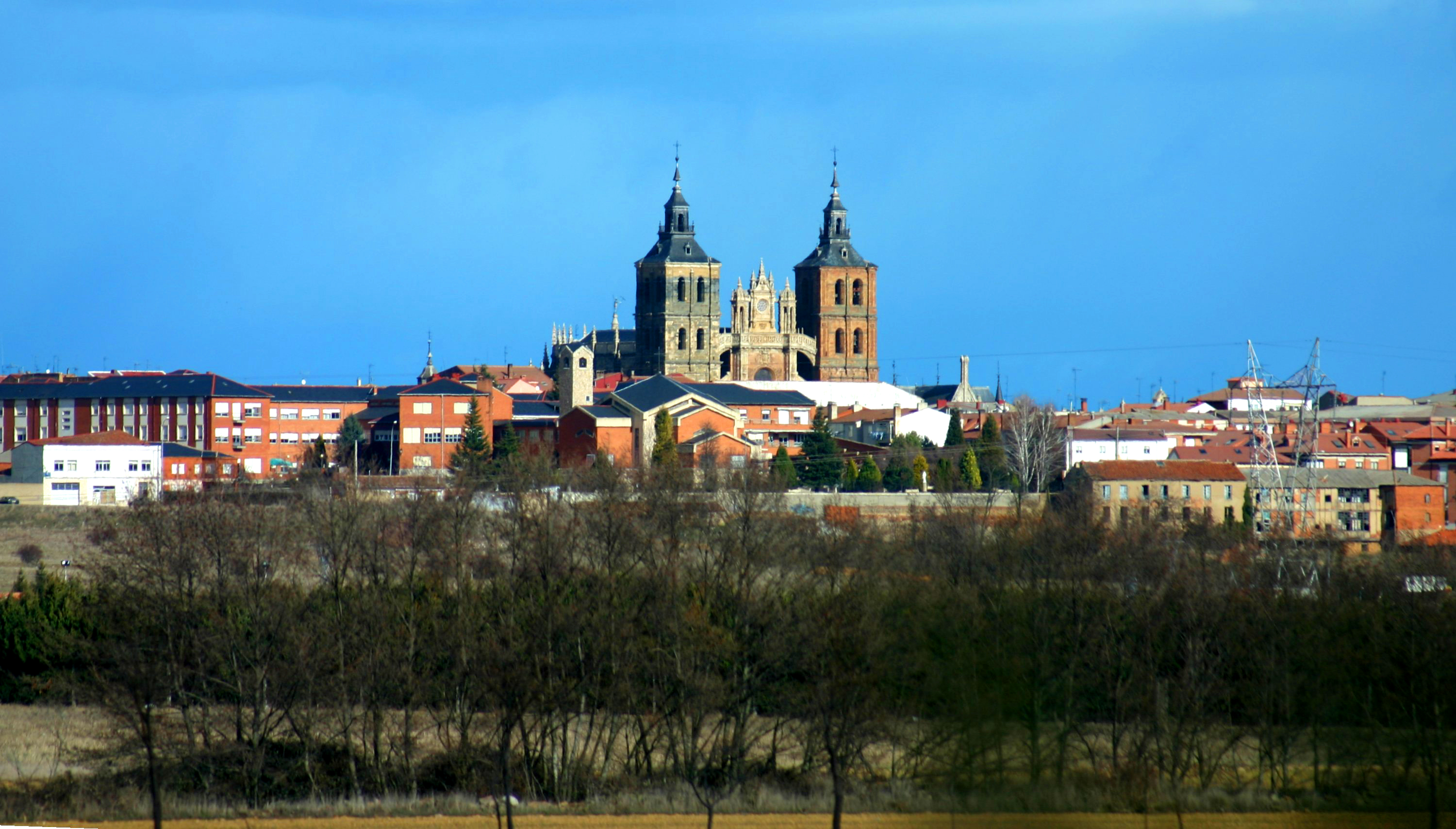 Astorga, León. Sobresaliendo de los edificios puede verse la Catedral de Santa María cuya construcción inicio el obispo Alvaro Osorio y Guzmán en 1444. Author: Year of the dragon